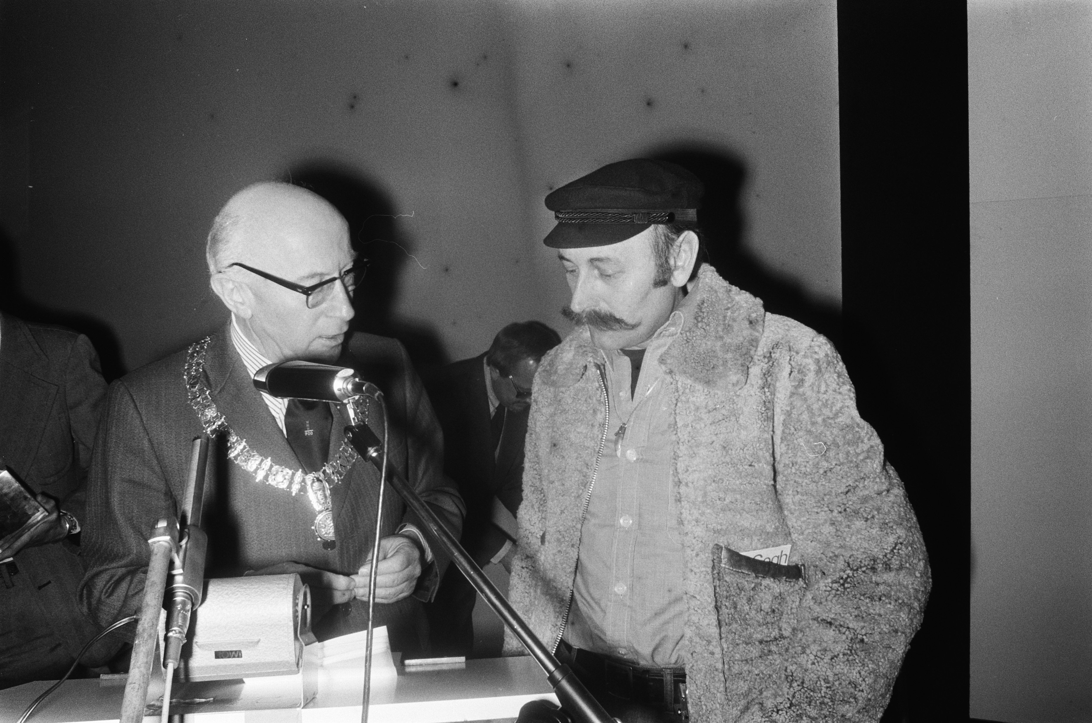 Collectie / Archief : Fotocollectie Anefo Reportage / Serie : [ onbekend ] Beschrijving : Burgemeester Samkalden opent tentoonstelling "Amsterdam, Beeld van een stad" in Van Goghmuseum ; Samkalden (l) en Cor Jaring Datum : 16 april 1975 Trefwoorden : burgemeesters, openingen, tentoonstellingen Persoonsnaam : Cor Jaring Instellingsnaam : Rijksmuseum Vincent van Gogh Fotograaf : Peters, Hans / Anefo Auteursrechthebbende : Nationaal Archief Materiaalsoort : Negatief (zwart/wit) Nummer archiefinventaris : bekijk toegang 2.24.01.05 Bestanddeelnummer : 927-8760